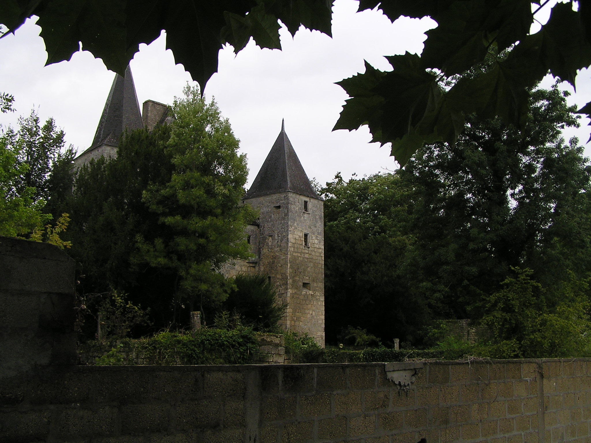 abbaye Notre-Dame de La Couronne (Charente)